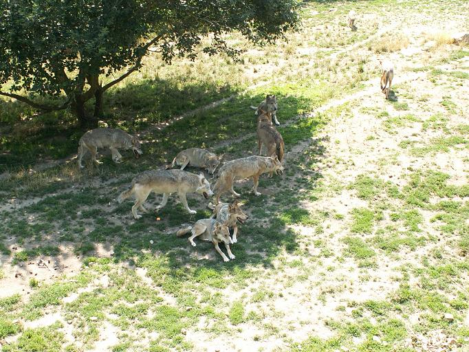 Canis lupus.